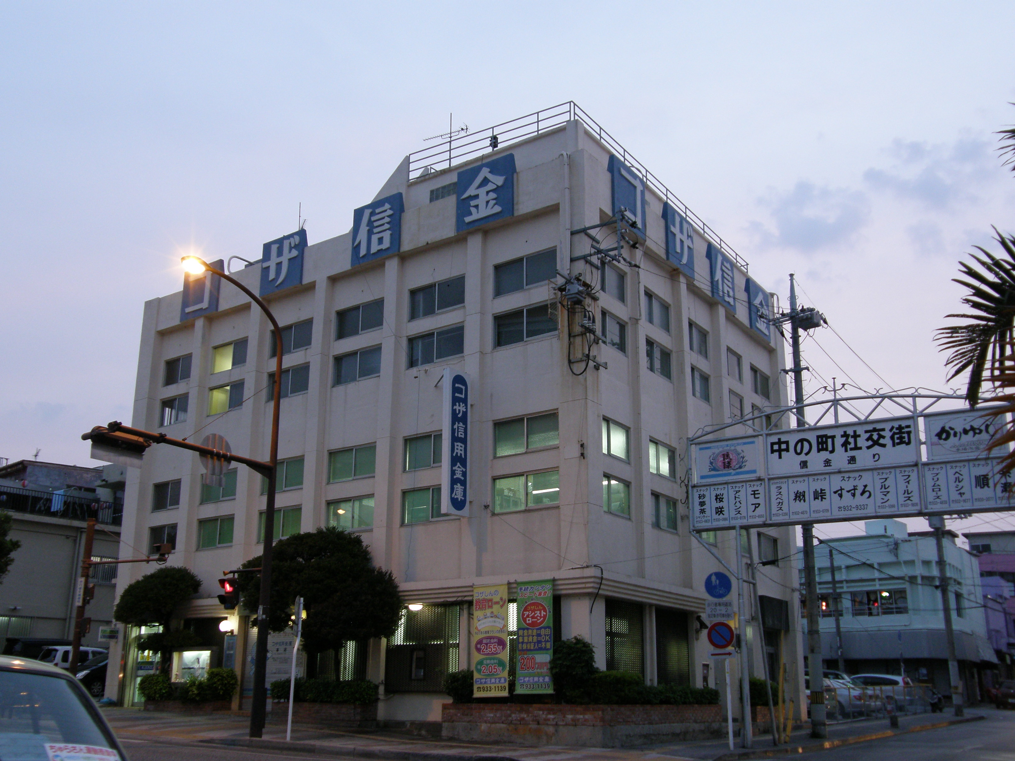 2014年、建物解体前に撮影